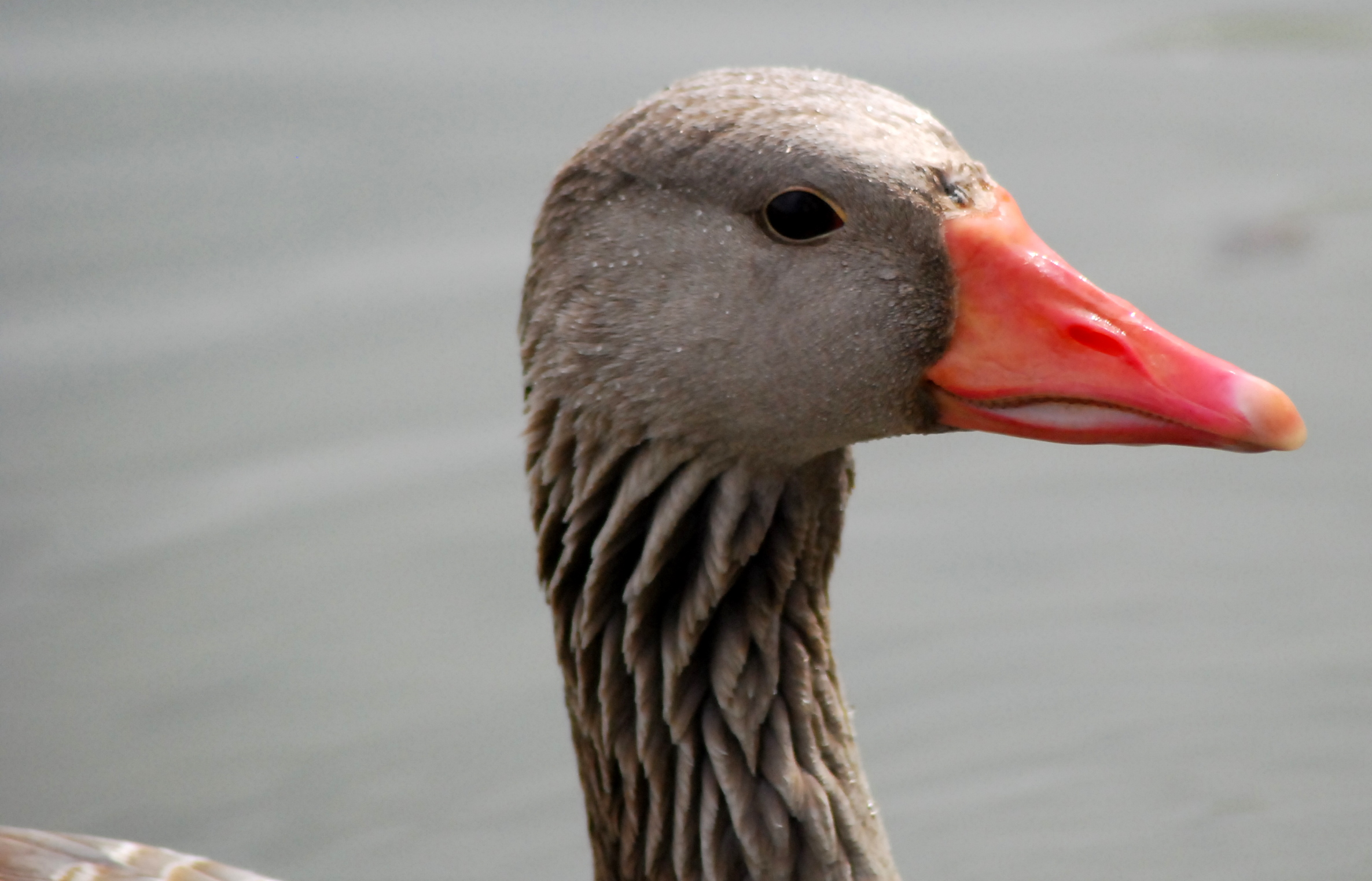 灰雁